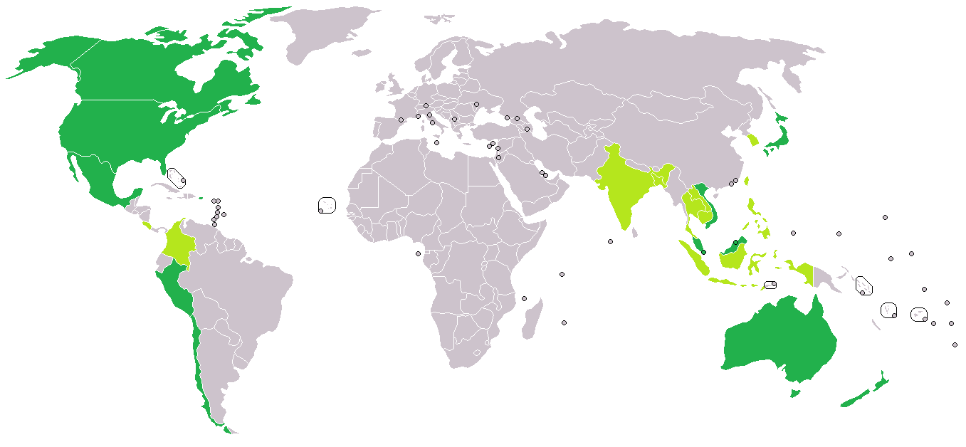 トランプ大統領が脱退を表明する以前のTPP参加国